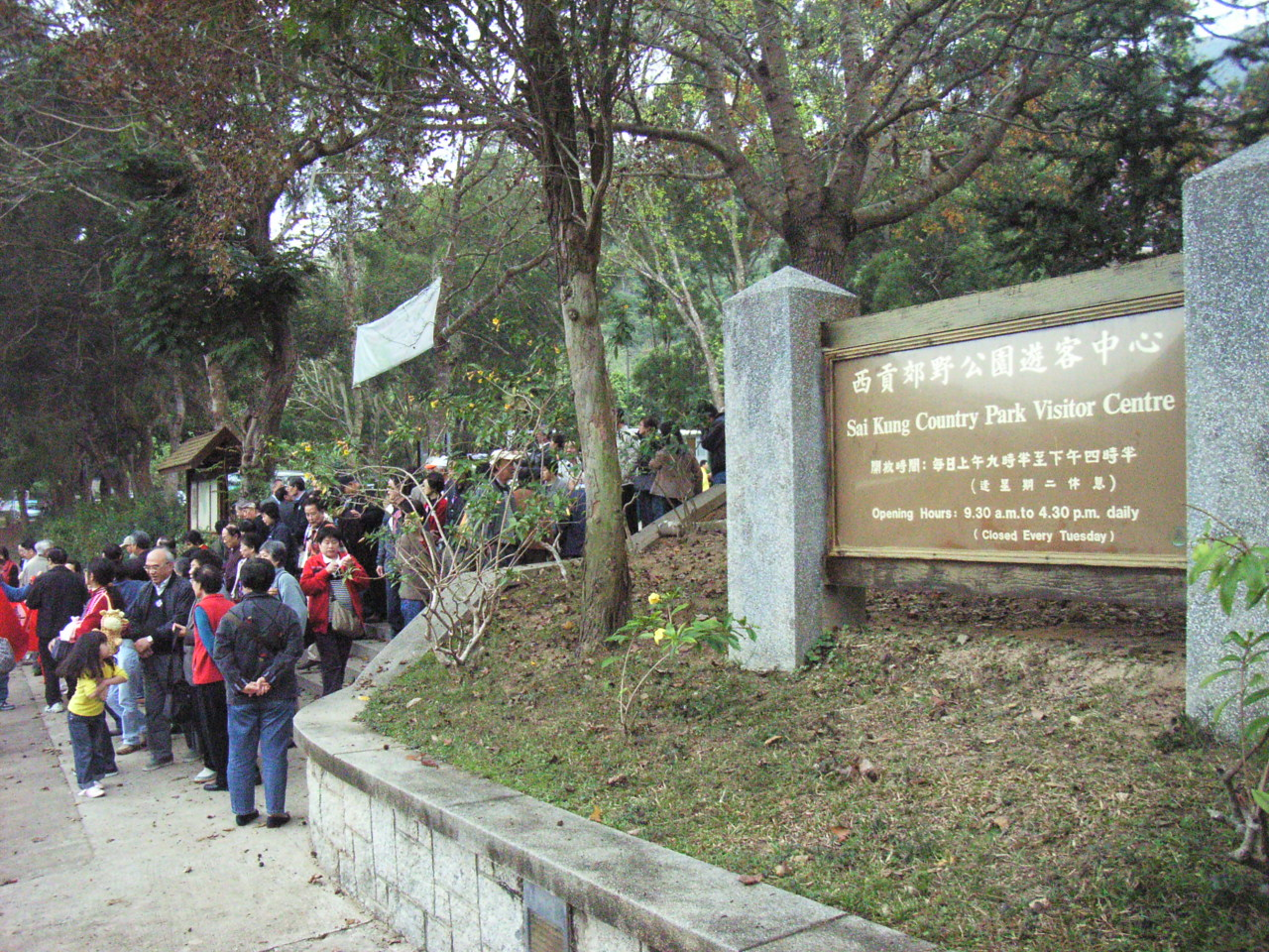 西貢郊野公園遊客中心位於北潭涌巴士總站的北面. (Photo by me.)